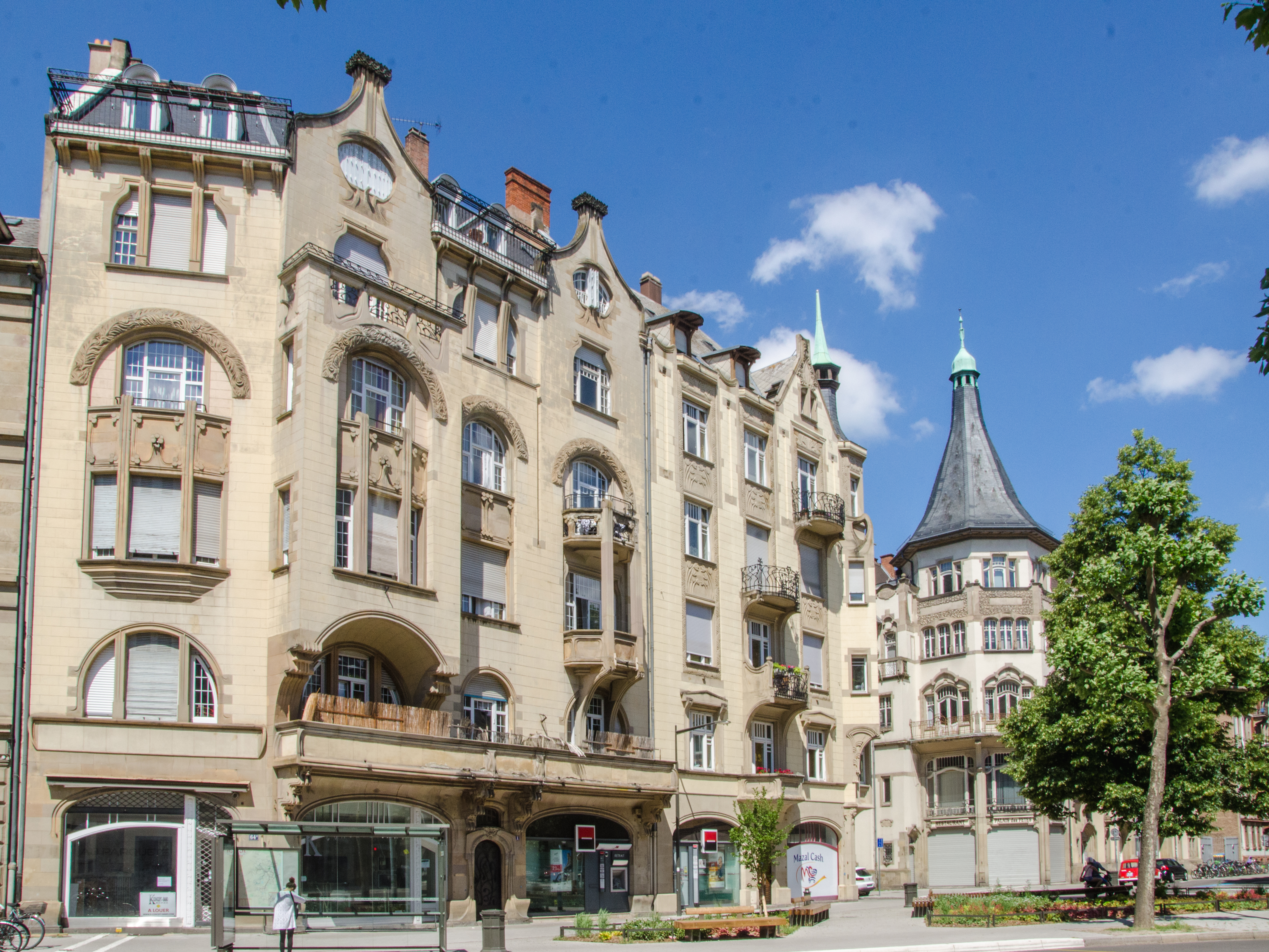 A proximité d'une grande artère de Strasbourg, l'avenue des Vosges, plusieurs immeubles sont sortie de terre au début du XXe siècle pendant l'extension de la Neustadt. Par chance l'art nouveau était en grand expansion également à cet époque et permet à se quartier de ne ressembler à aucun autre avec ces maisons et immeubles tout aussi unique les uns que les autres.